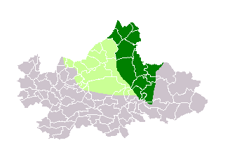 Made by Grönneger 1. Edited by Servien West-Veluws = light green Oost-Veluws = dark green